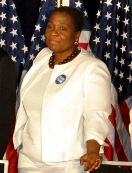 DNC Winter Meet 1258